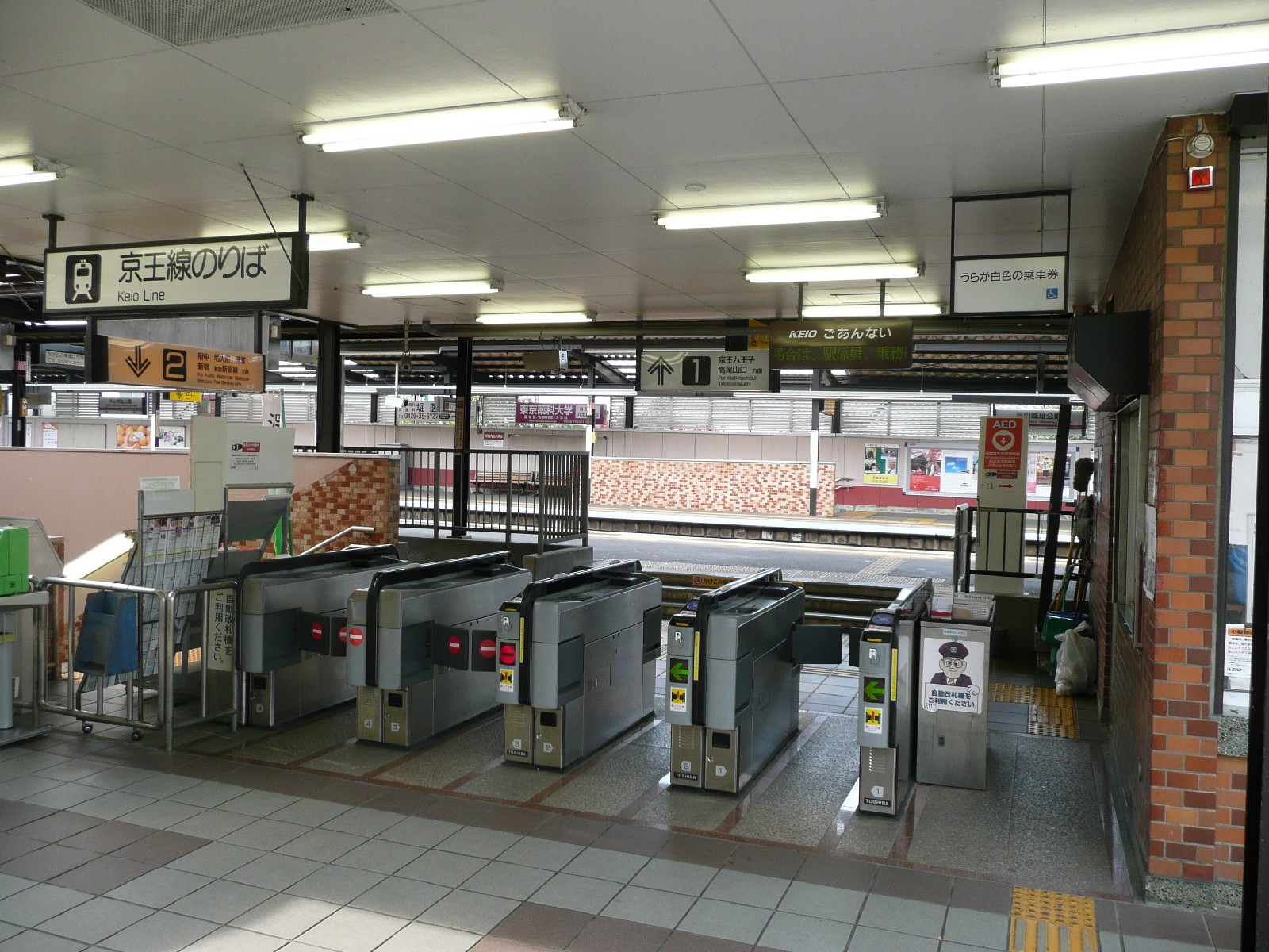 平山城址公園駅改札口